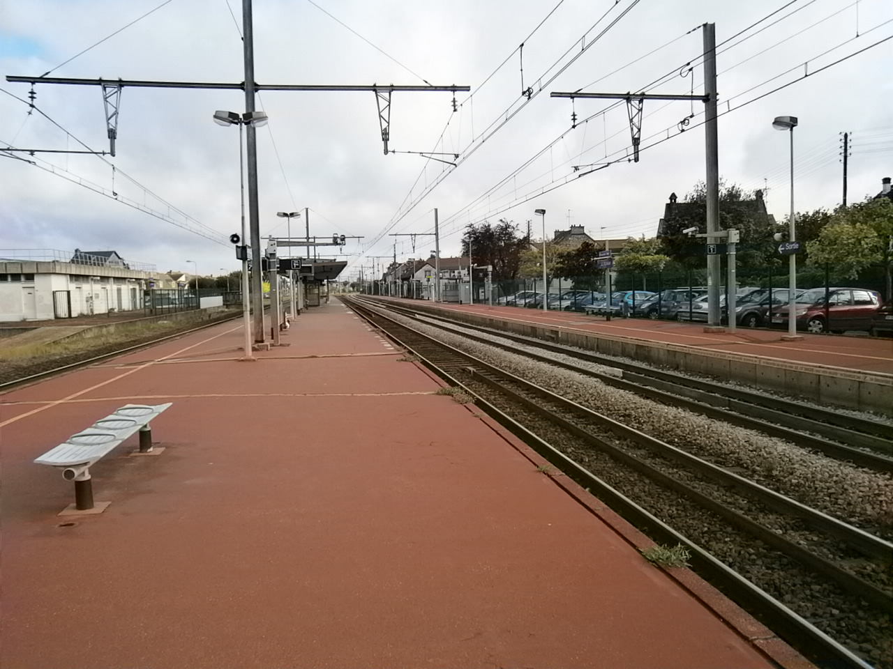 Gare du Perray (78) : Vue en direction de Paris, du quai central.